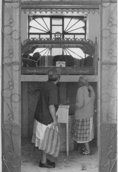 Capilla del Pocito, en San Lorenzo Tezonco. Fue construida en el lugar donde, según la tradición popular, brotó un manantial de agua milagrosa que curó a los enfermos de la epidemia de cólera que azotó al Valle de México a mediados del siglo XIX. (Iztapalapa, México, D. F., México).